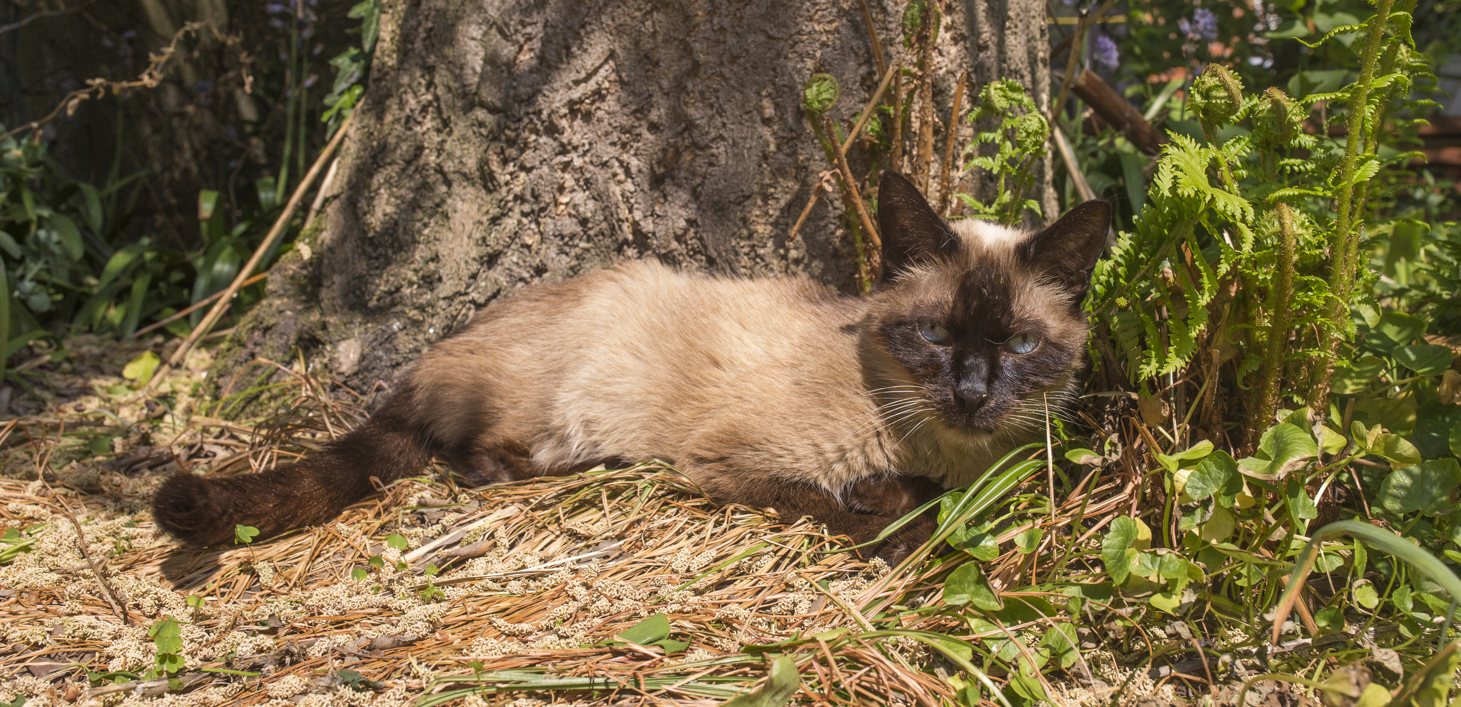 Tonkinese poes